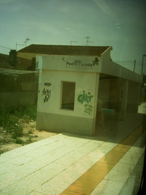 Apeadeiro ferroviário da Pedra Furada